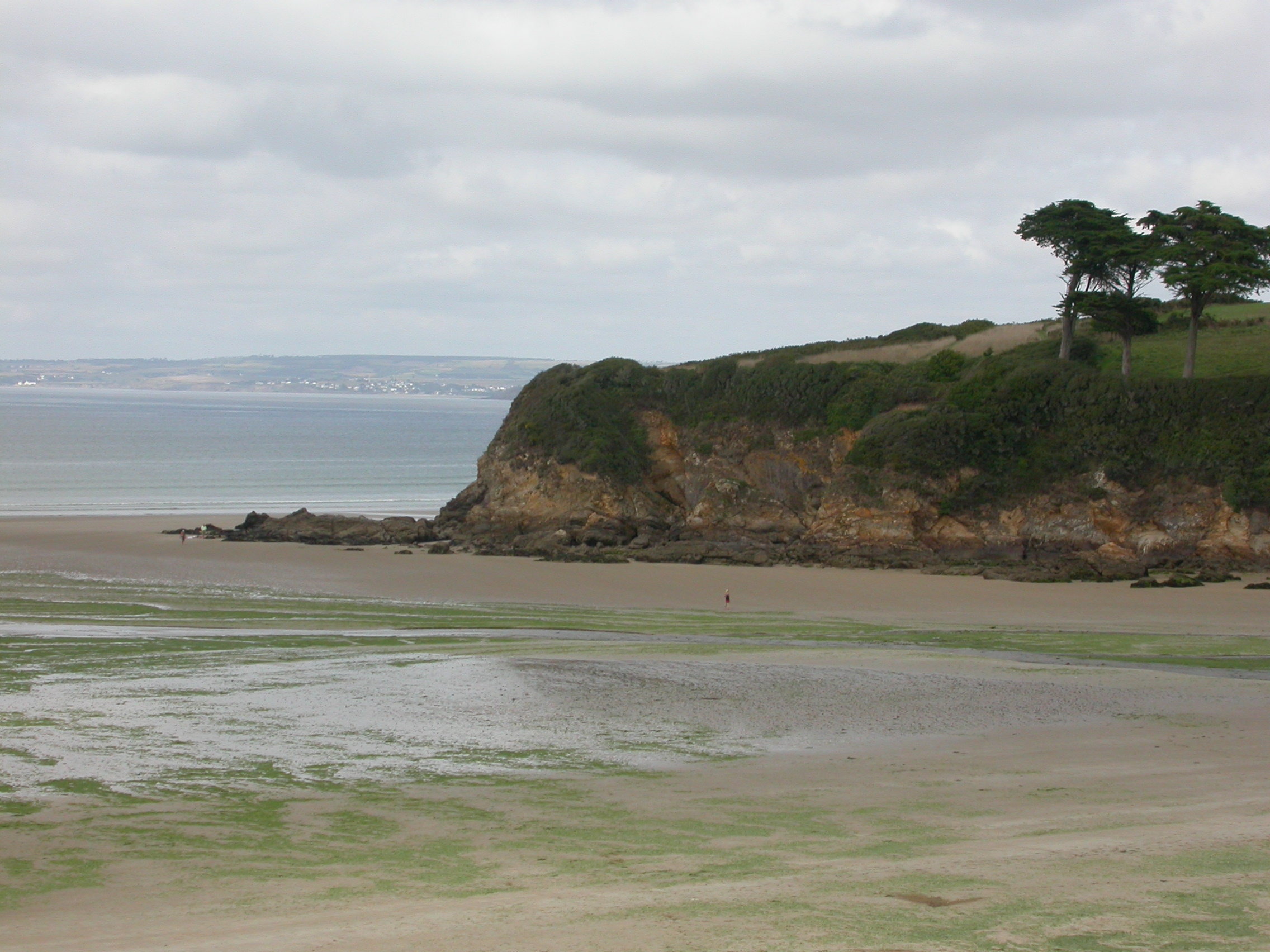 La plage du Ris [Ry] à Douarnenez et la pointe de Kastell ar Bardeg